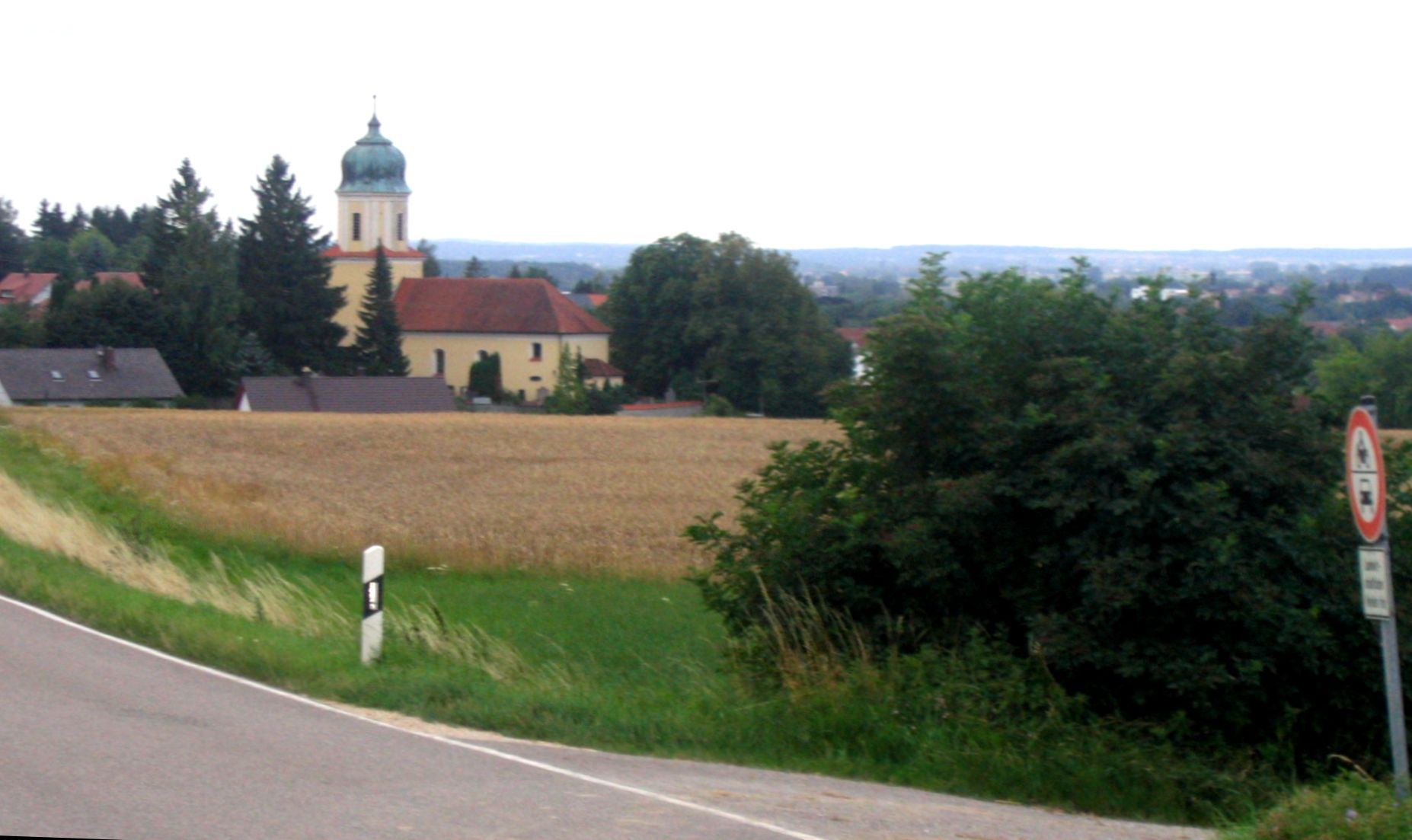 Bild von Ried von der Eichstätter Straße betrachtet.